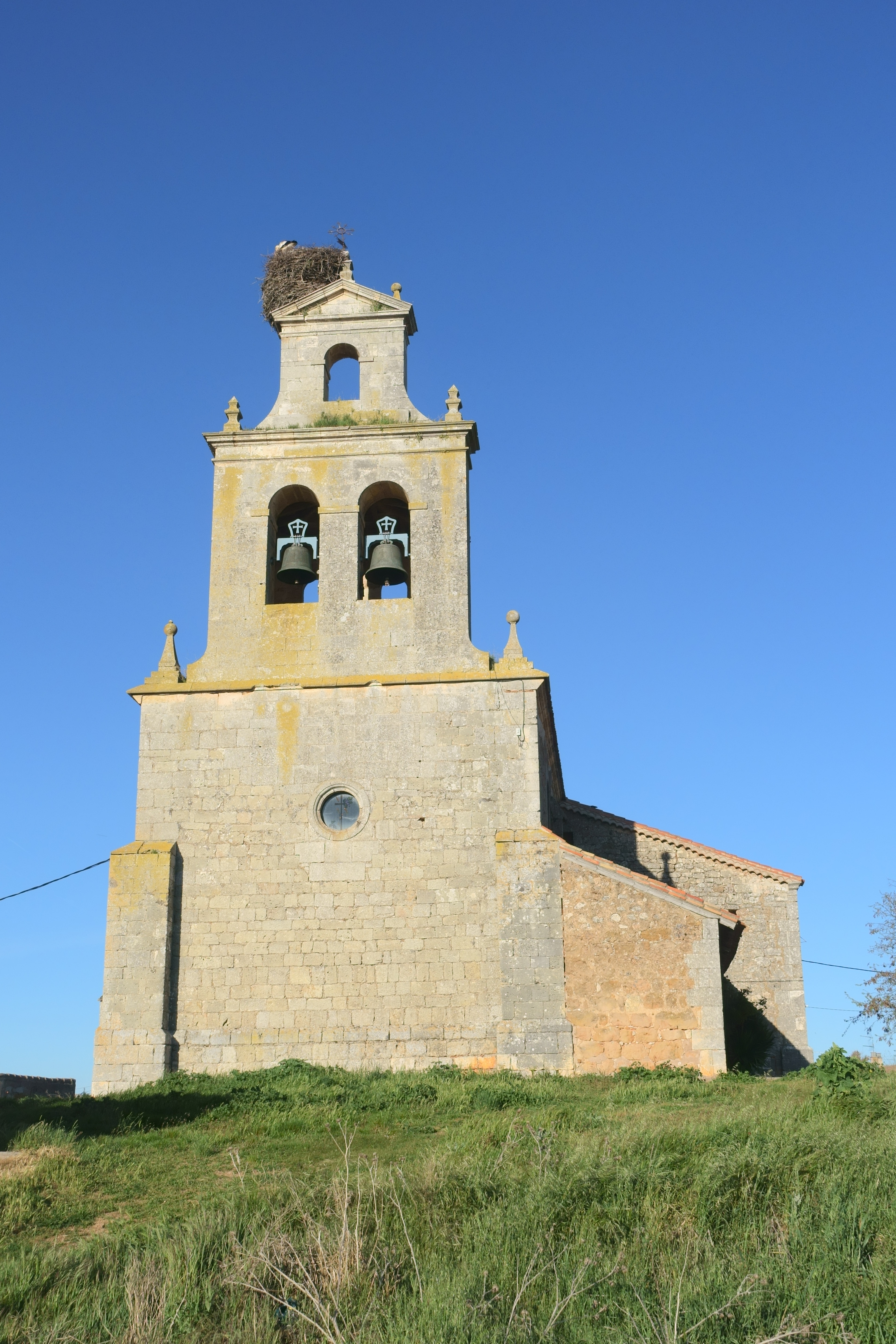 Iglesia de Santiago Apóstol, Torrecilla del Monte (Burgos, España).